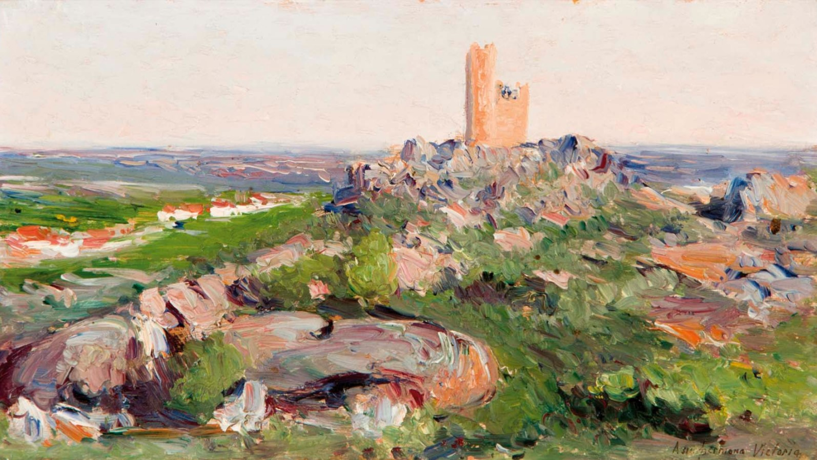 Atalaya de Torrelodones, de Aureliano de Beruete y Moret (Madrid, 1845 - 1912). Óleo sobre tabla (14,4 x 27,5), pintado a finales del siglo XIX.